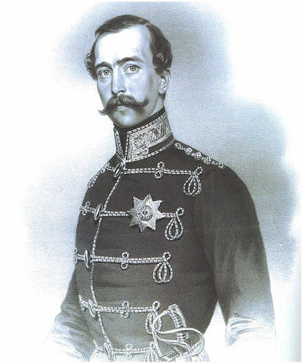 Maximilian de Beauharnais Maximilian, Duke of Leuchtenberg Maximilien de Leuchtenberg Maximiliaan van Leuchtenberg Maximilian av Leuchtenberg